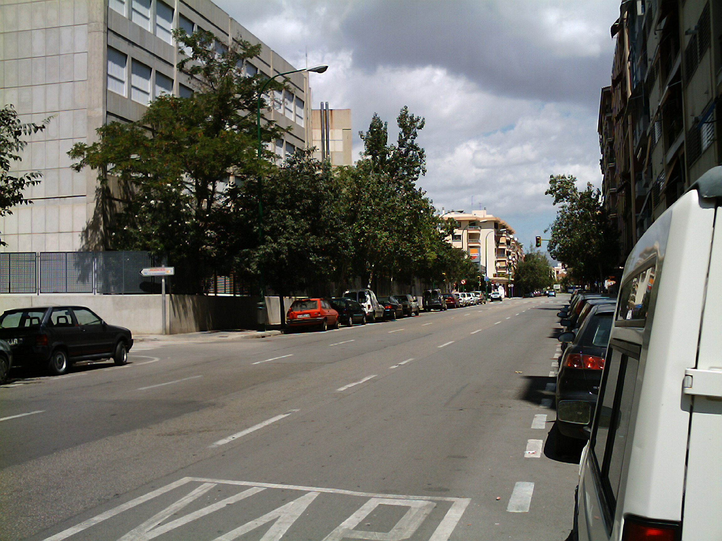 Carrer Capità Salom de Palma (Mallorca) Autor: P. Pérez